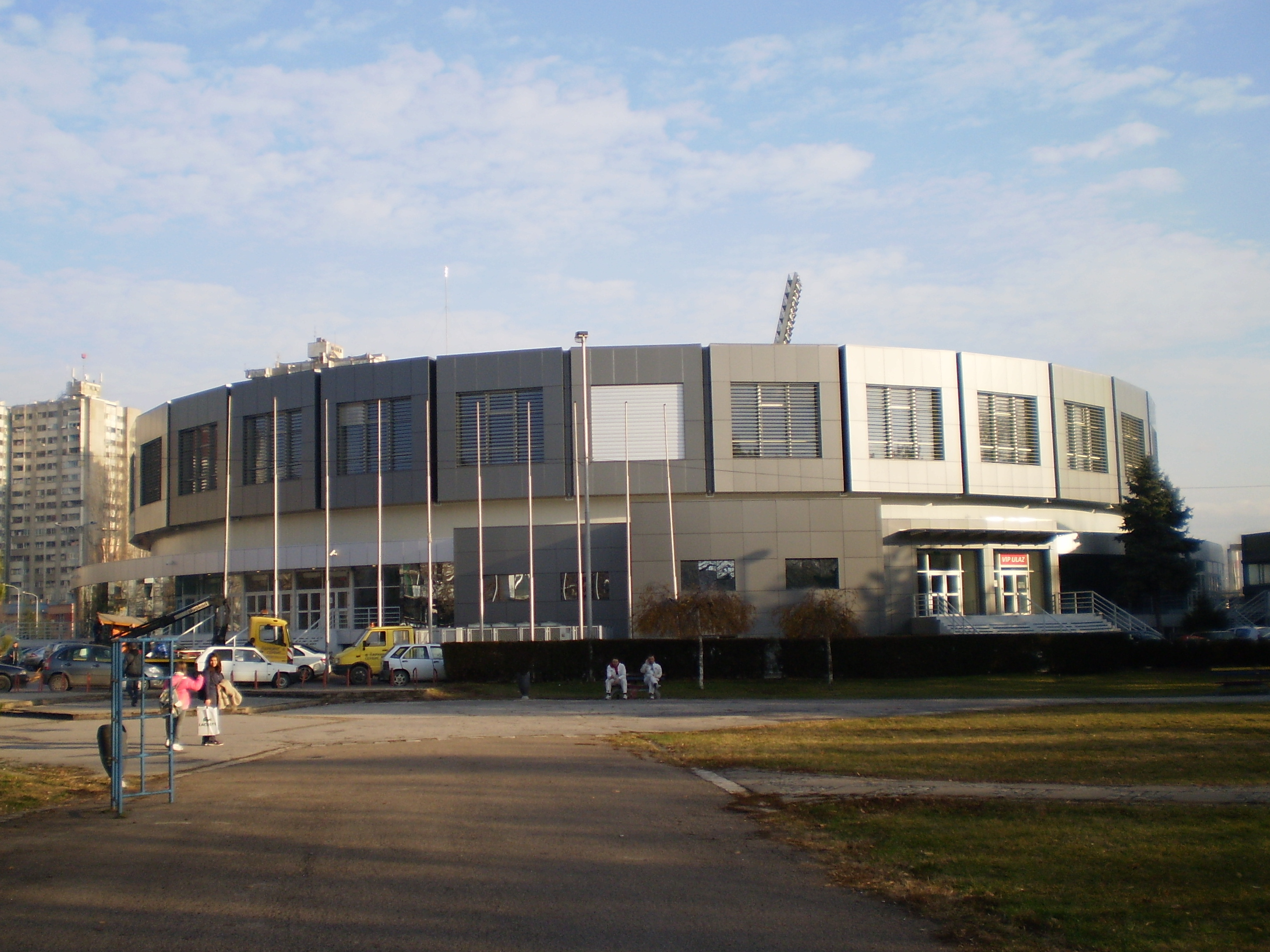 Sportska hala Čair u Nišu, nakon renoviranja 2011. Autor: dr Milorad Dimić, Niš, Srbija, 13.12.2011